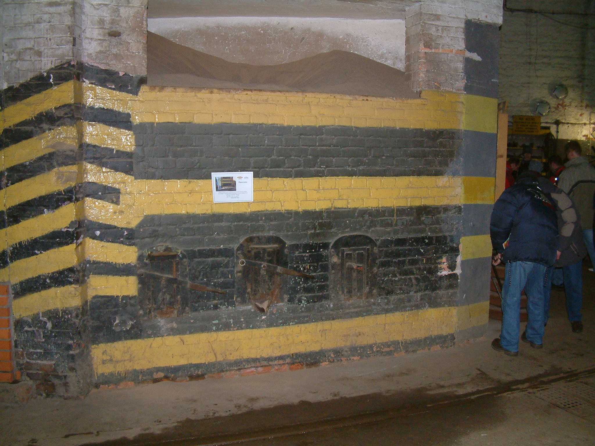 Piasecznica in Gajowa tram depot in Poznań